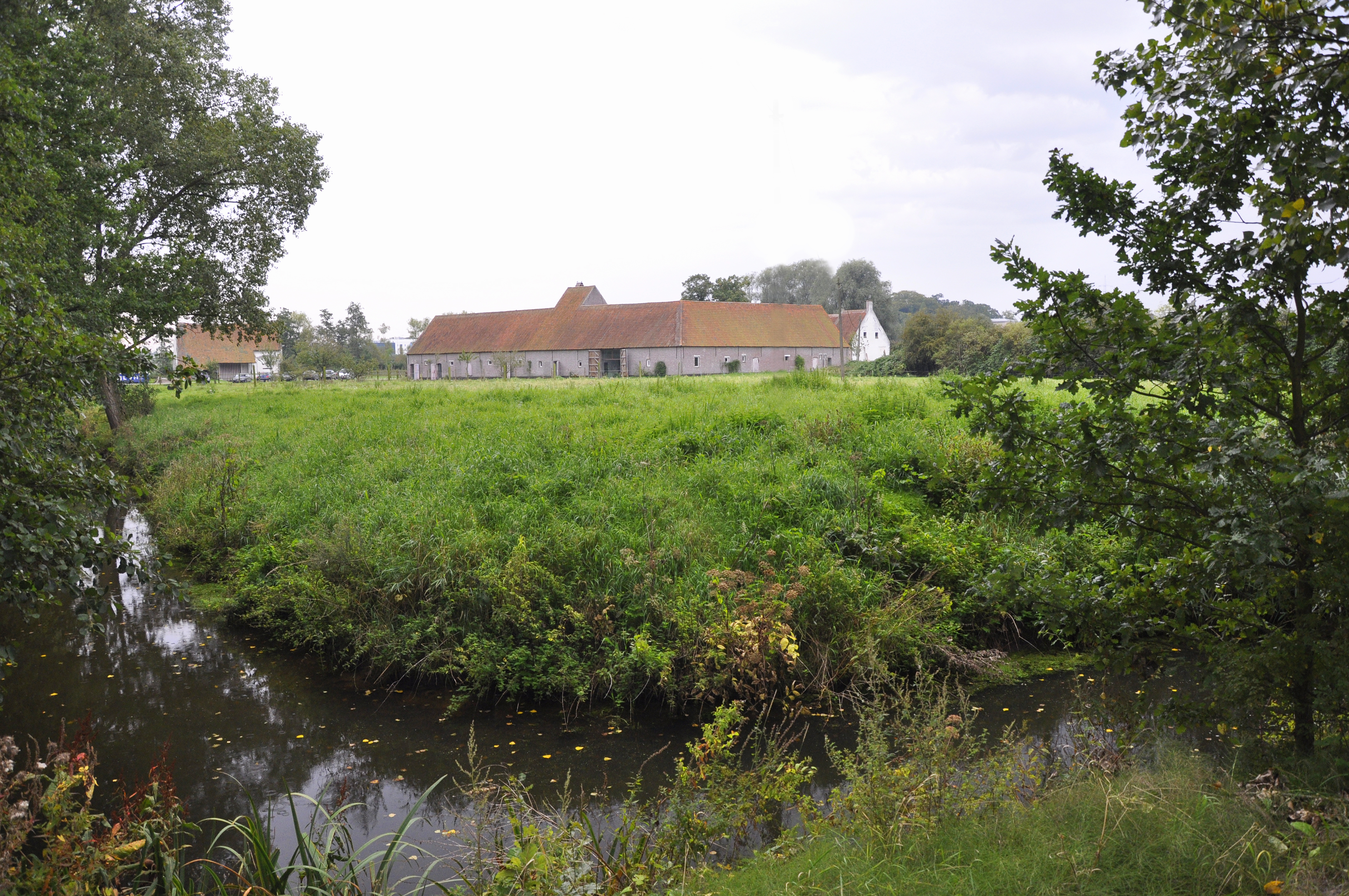 De Bosseveerhoeve van de intussen verdwenen abdij Nieuwenbosch te Heusden (Destelbergen), België